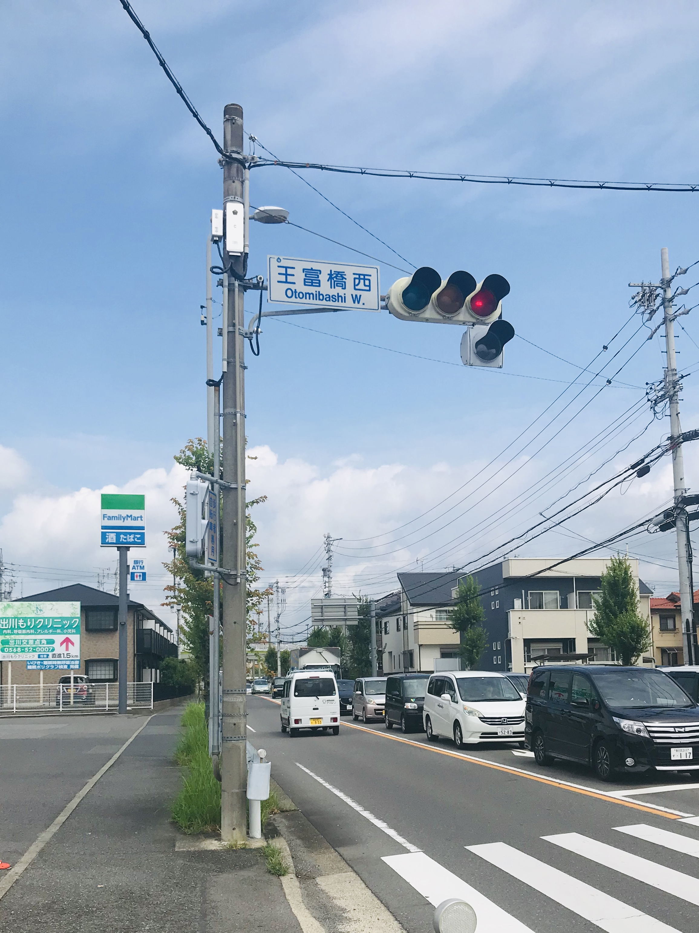 大留町だが「王富橋西」と書かれた標識があり、大留町の地名の変遷が分かる。